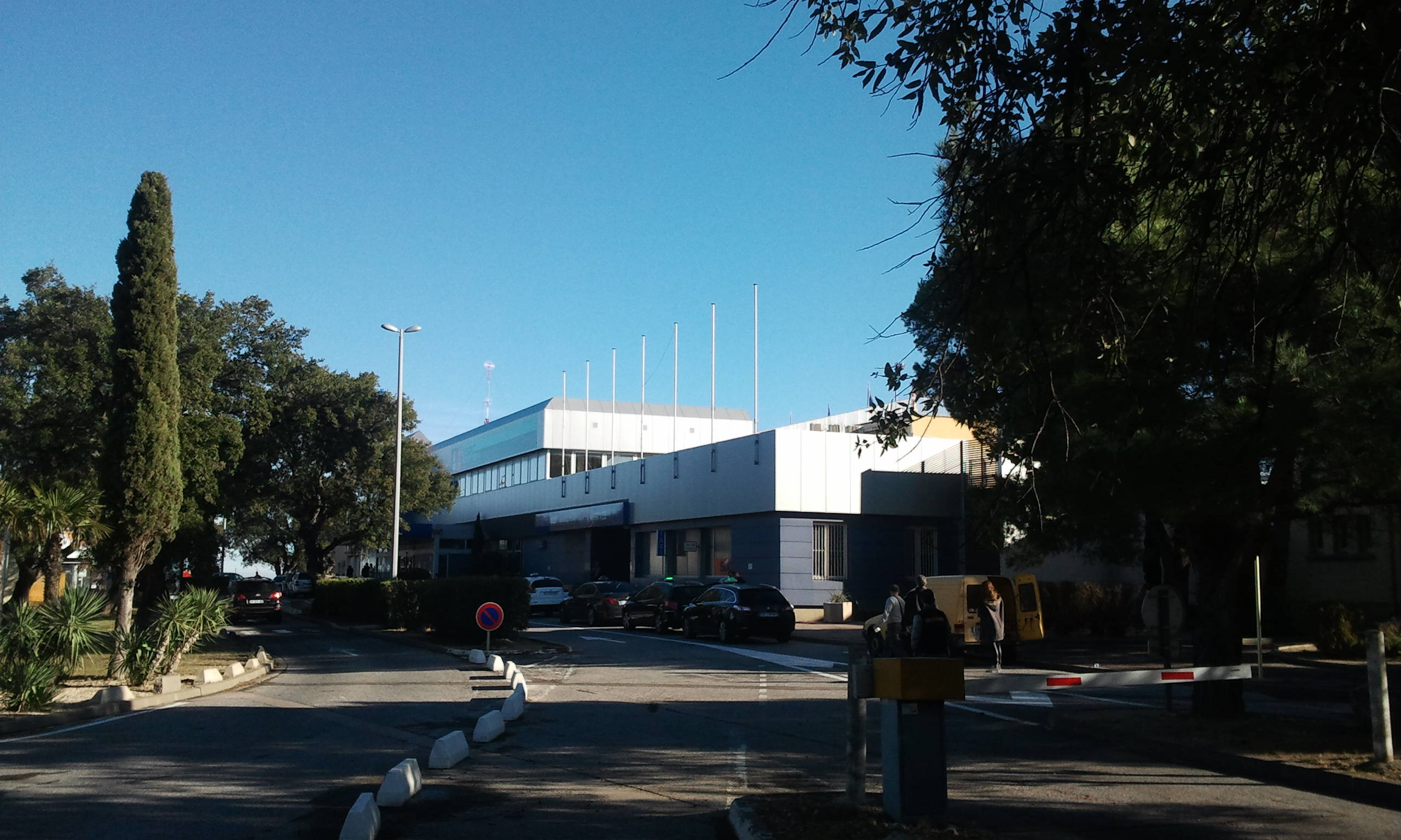 Hall d'accueil des passagers à l'aéroport de Perpignan-Rivesaltes